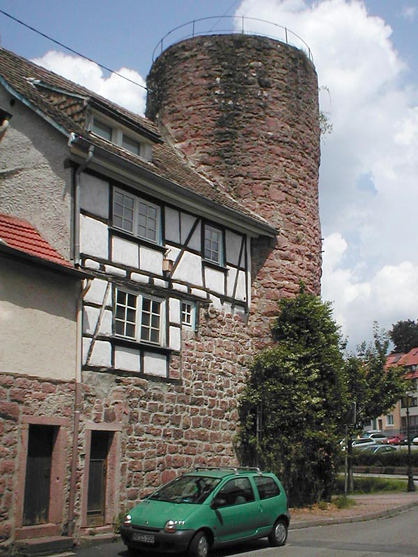 Rosenturm (früher: Roßbrunnenturm) in Eberbach, ältester der vier Stadttürme.